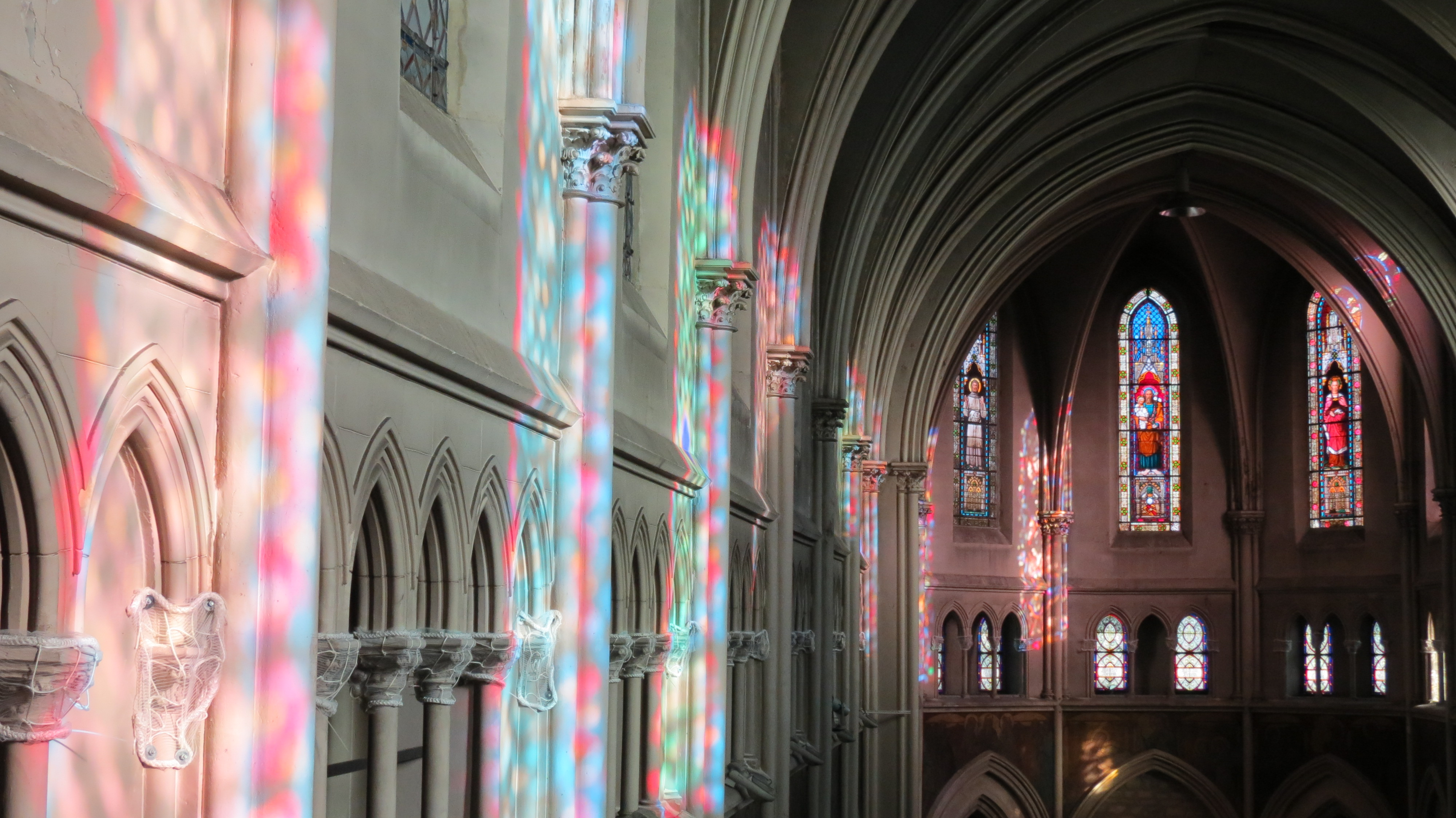 jeux de lumière sur les colonnes de l'église en septembre 2015